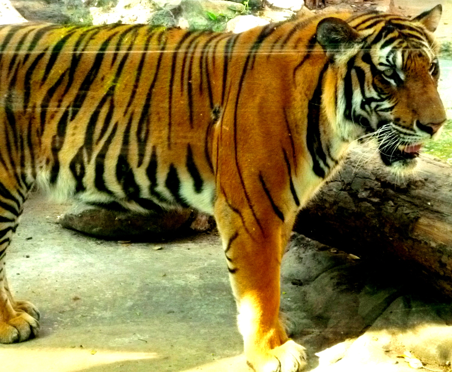 Hình tự chụp một con hổ Việt Nam (hổ Đông Dương) tại Thảo Cầm Viên Sài Gòn